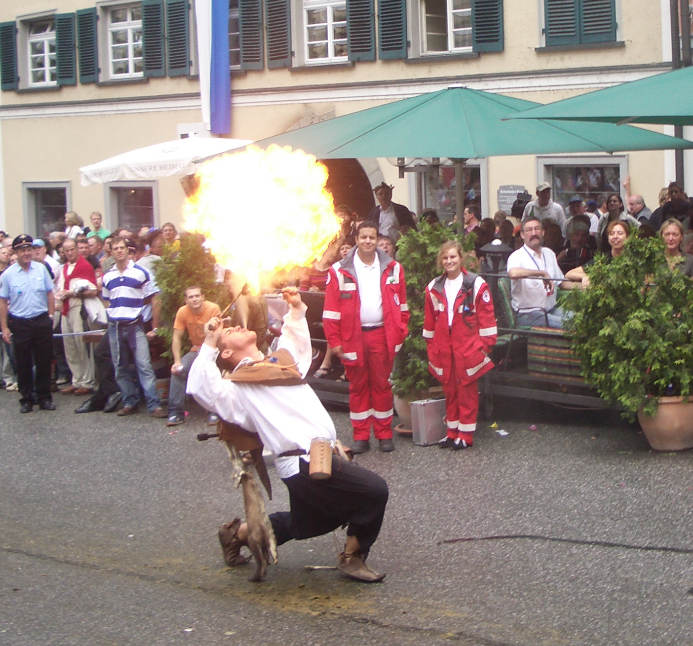 Ravensburg, Germany: Rutenfest, Festzug am Rutenmontag, Feuerspucker